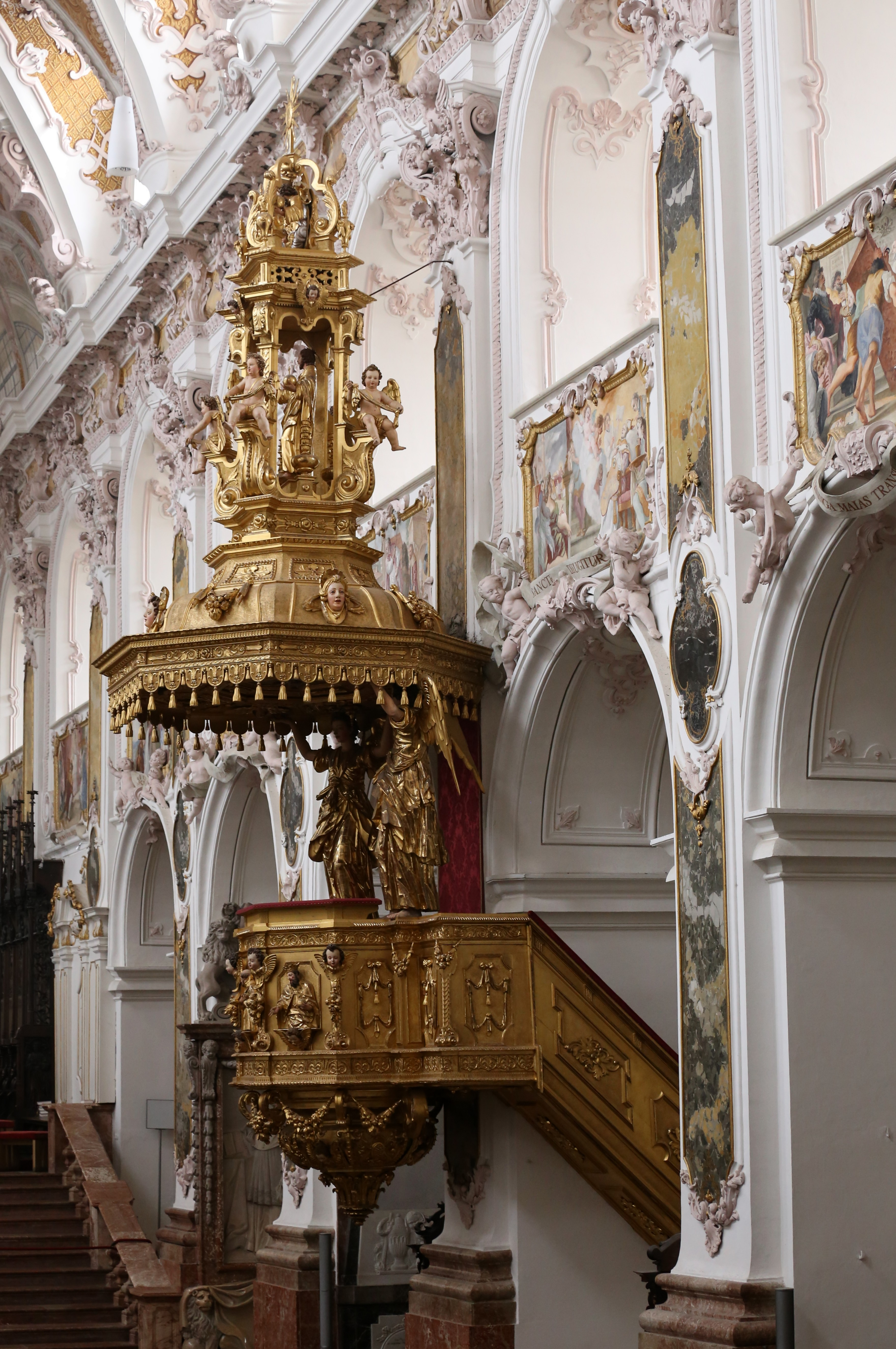 Domkirche Mariä Geburt und St. Korbinian, Freising, Kanzel